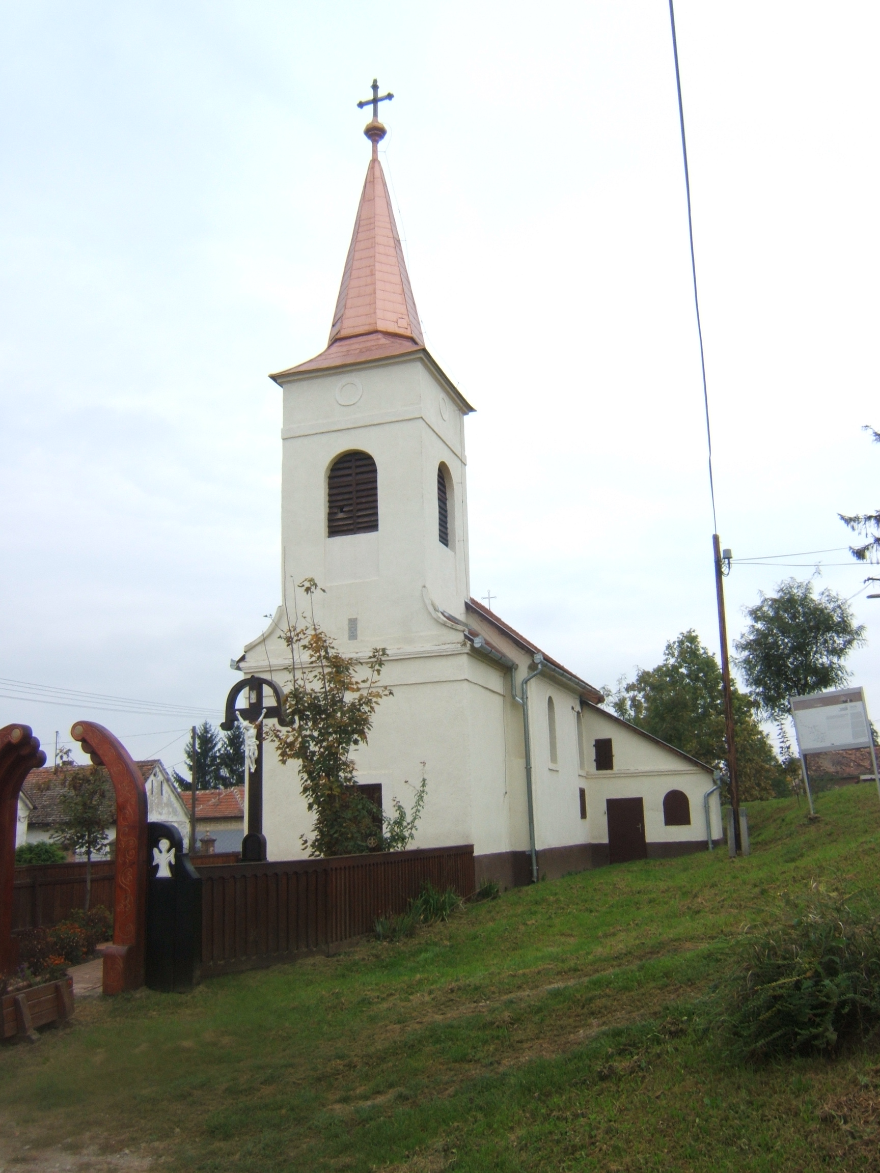 Cserdi temploma